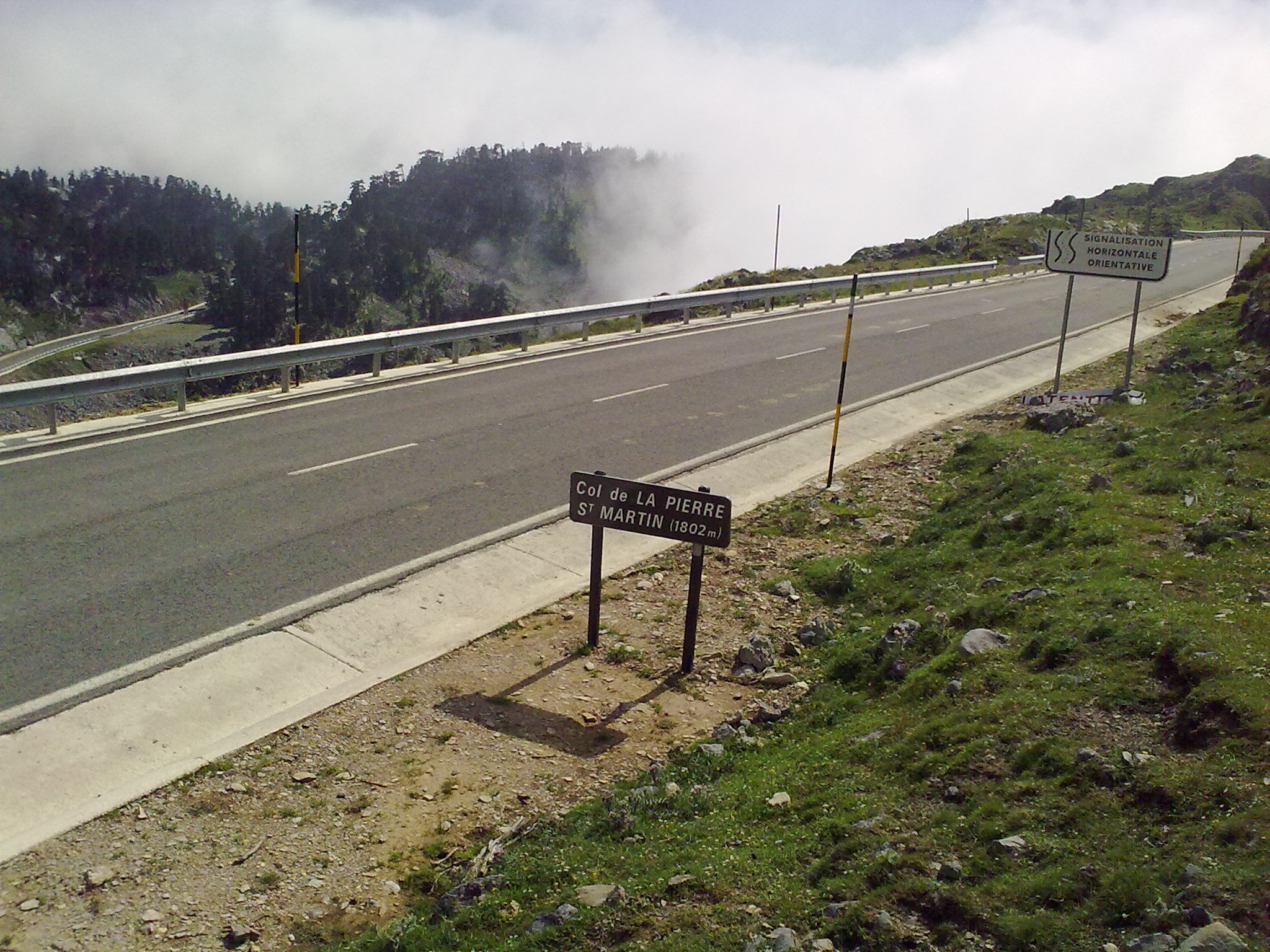 Col de la Pierre Saint-Martin le 4 juillet 2010